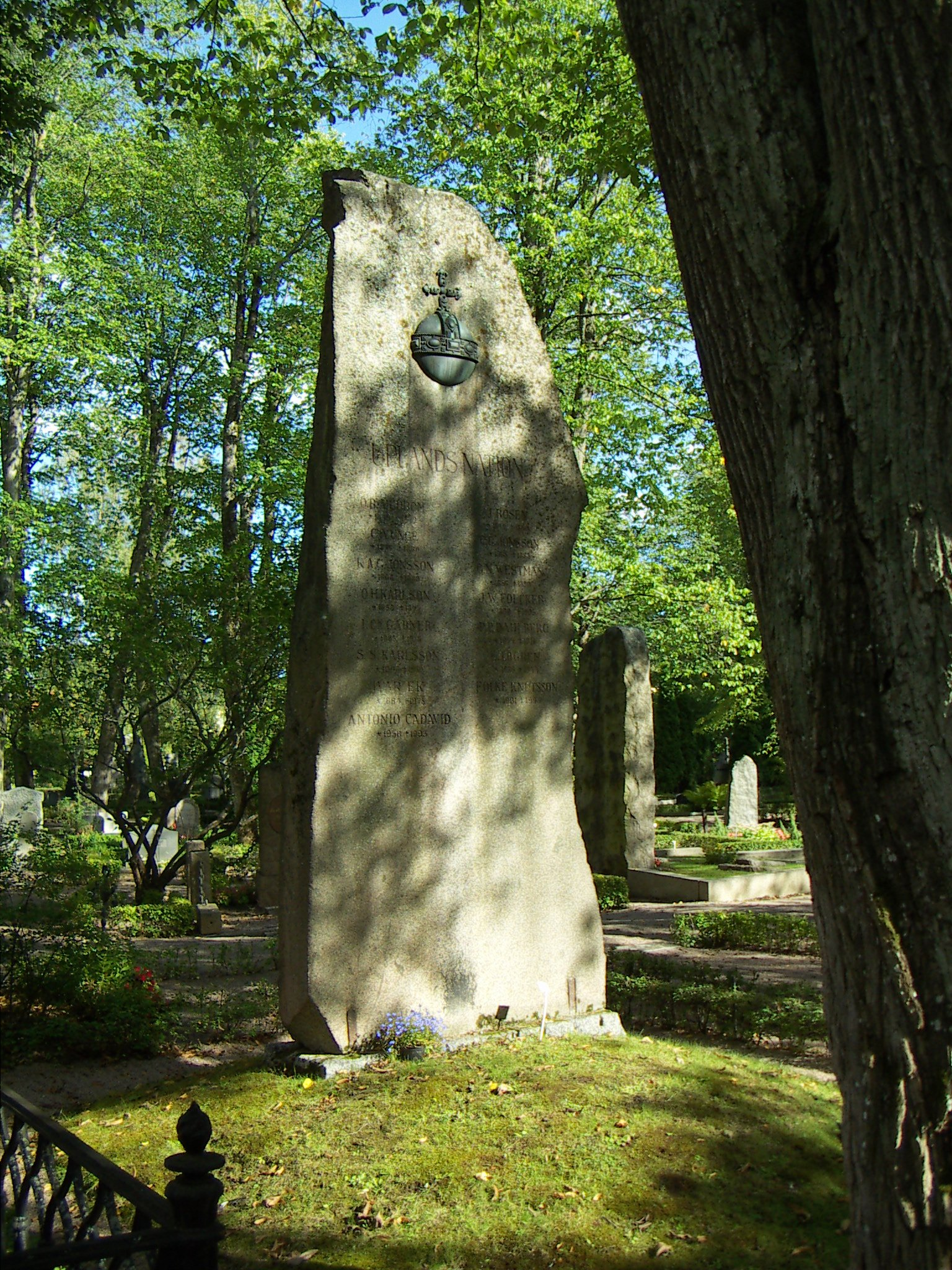 Uplands nationsgrav på gamla kyrkogården i Uppsala.